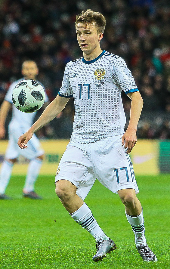 Россия проиграла Бразилии со счетом 0:3